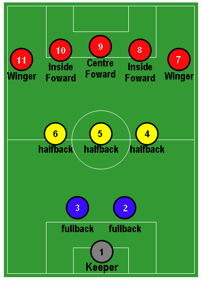 mia creazione